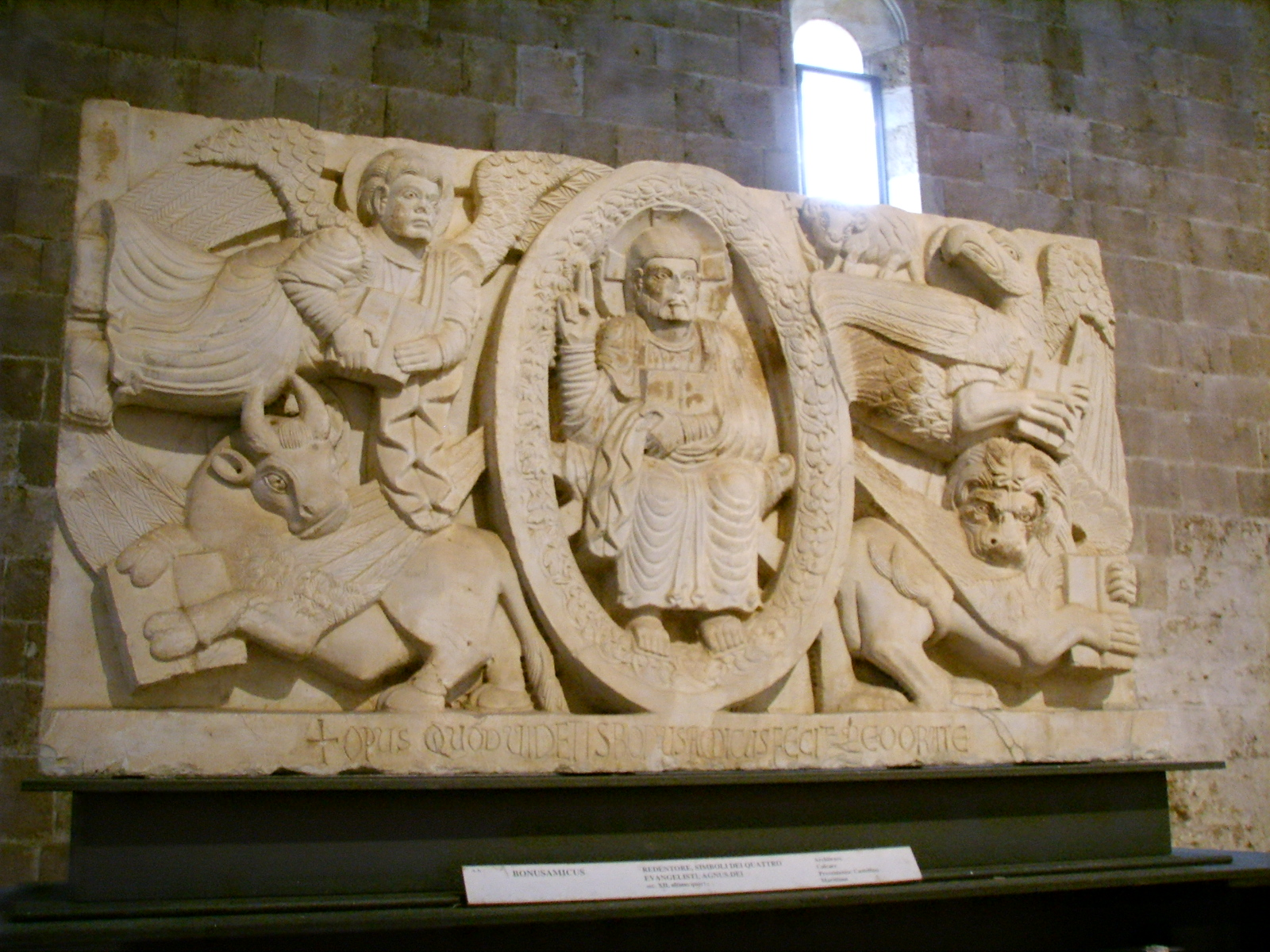 Museo di san matteo,bonusamicus, redentore e simboli degli evangelisti, ultimo quarto del XII secolo